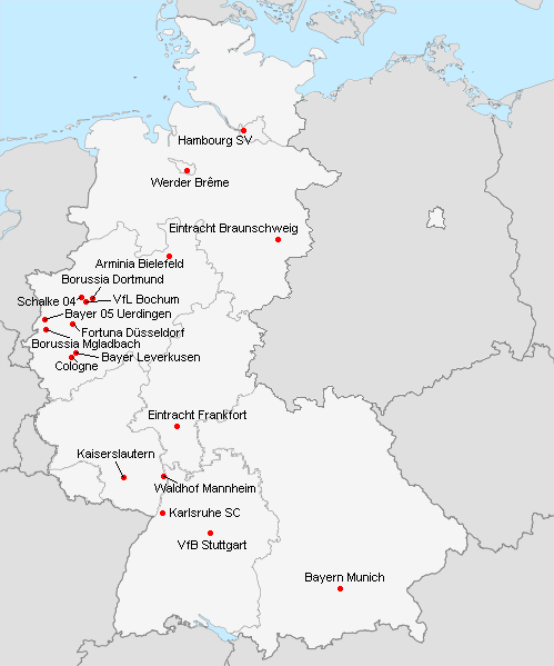 Répartition des clubs en 1.Bundesliga 1984-1985.